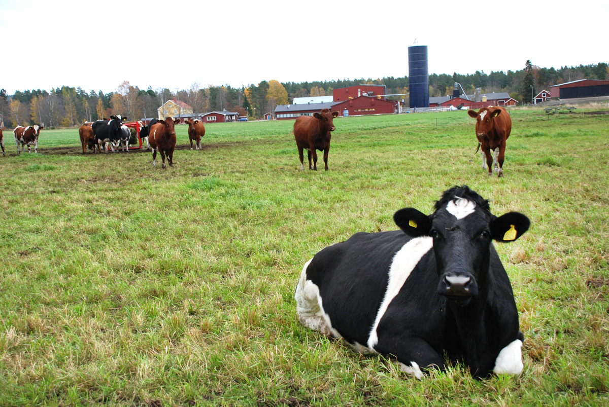 Kossor på äng.